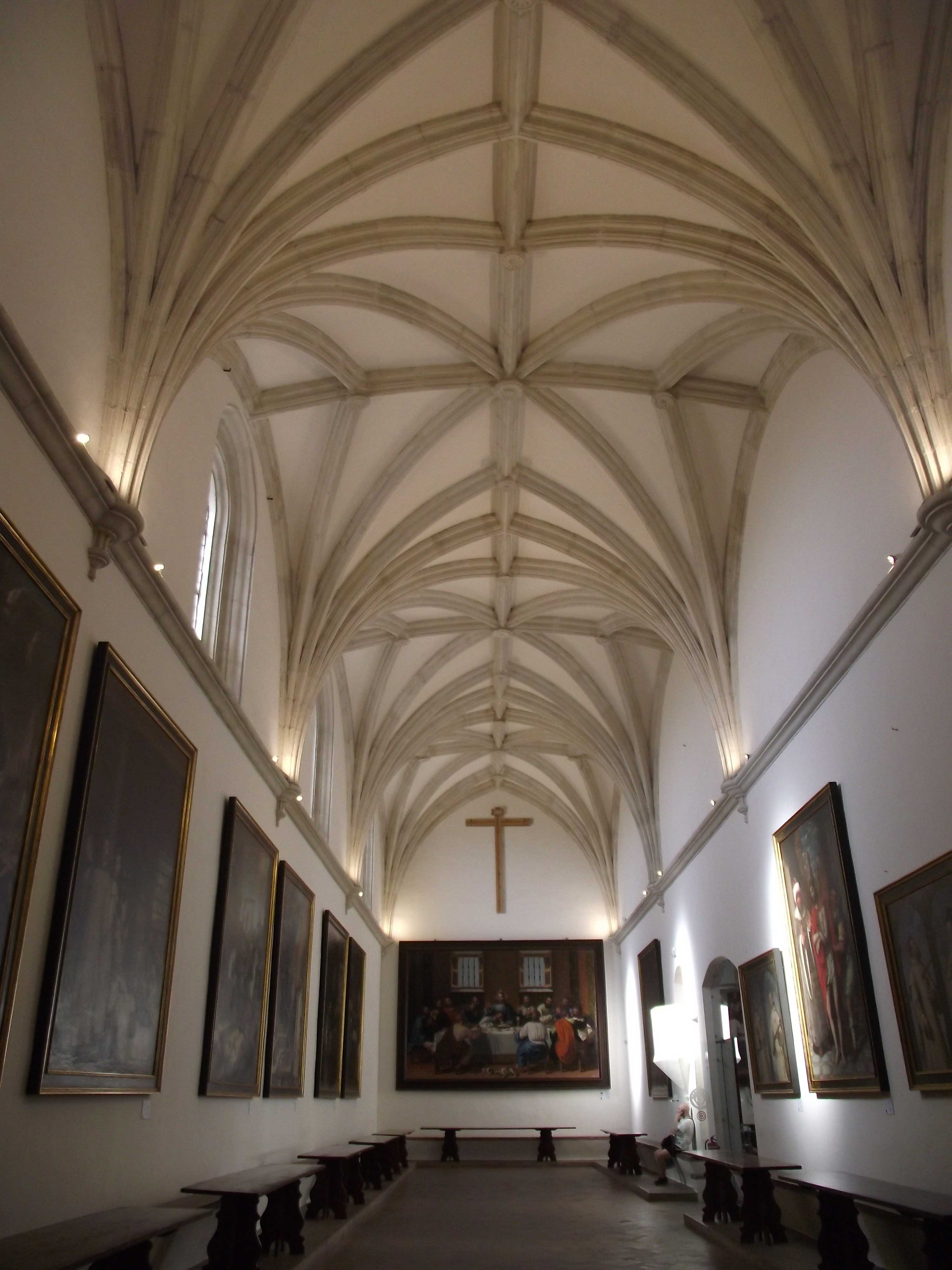 Cartuja de Granada, Refectorio